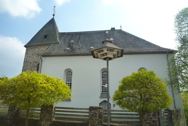 Evangelische Kirche in Kölschhausen